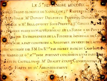 Pose de la 1e pierre, suite au décret de Napoléon 1er, le 5 septembre 1809